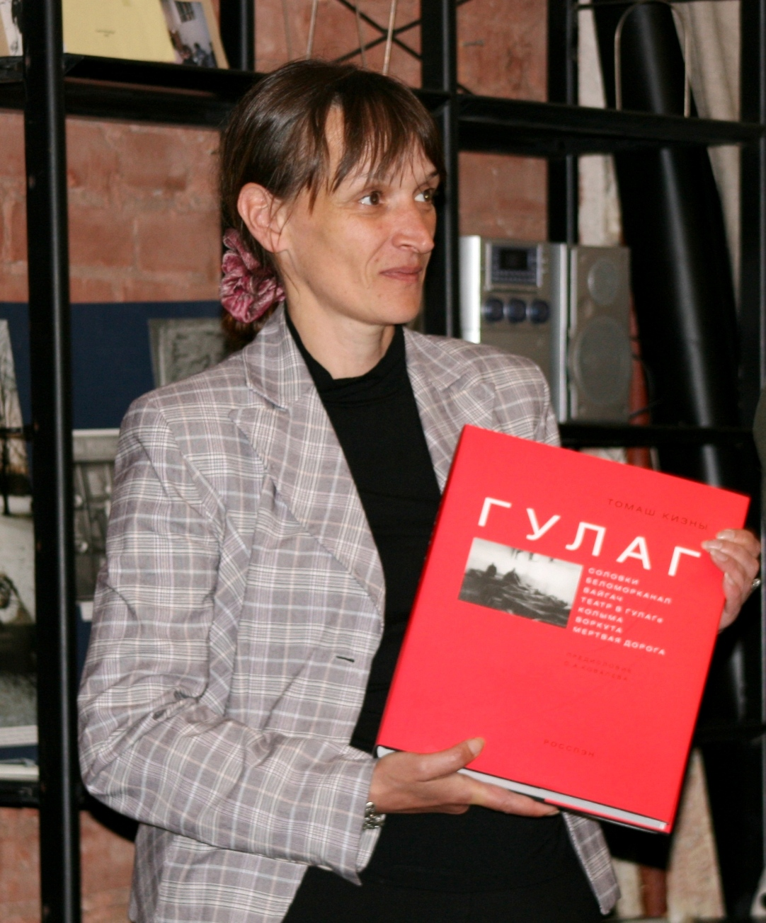 Flige.I.A.2008.JPG: Ірина Фліге в офісі НІЦ «Меморіал» презентує нове видання на зустрічі з представниками делегації української громадськості (Санкт-Петербург, 2008). Фото Сергія Шевченка